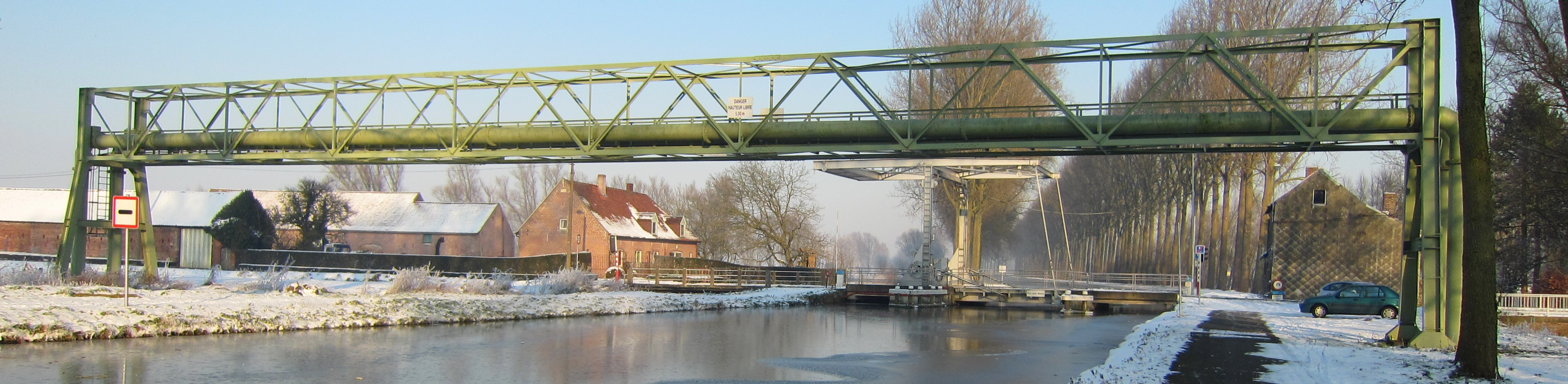 Le canal de Saint-Leger